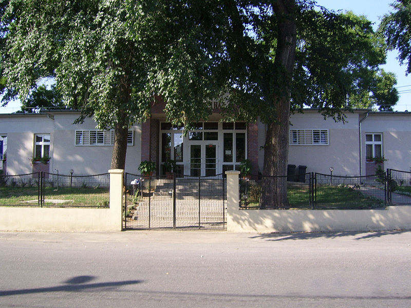 József Attila Művelődési Ház Balkányban.